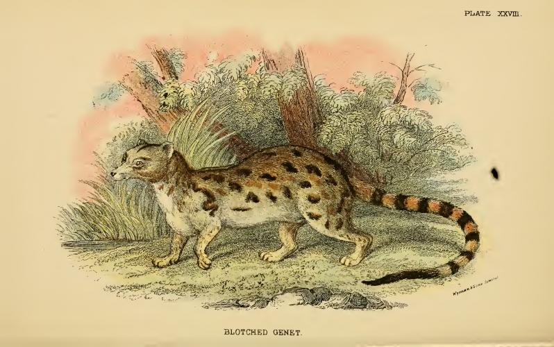 Blotched Genet / Genetta tigrina